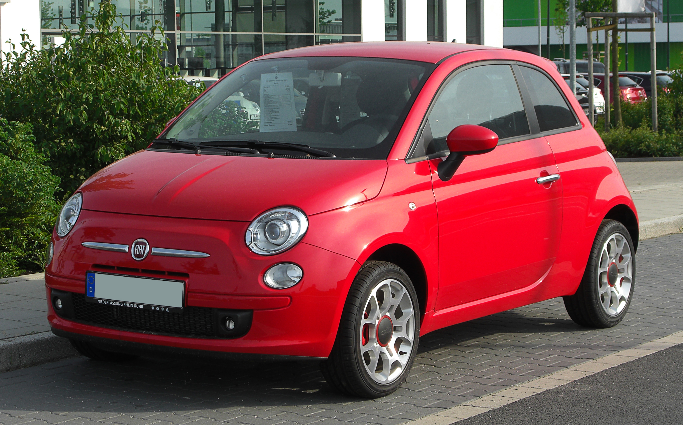 Fiat 500 1.4 16V Rosso Corsa